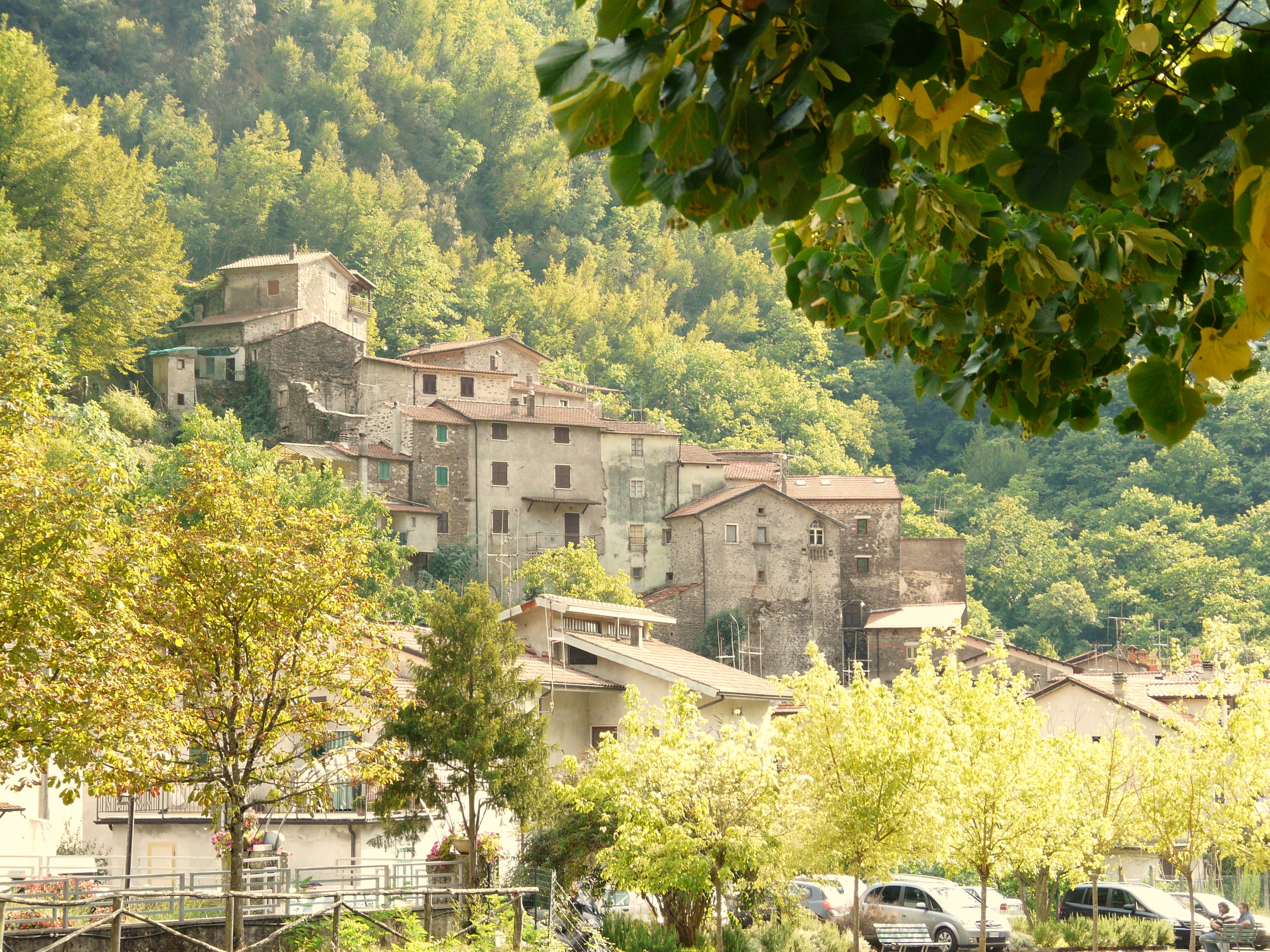 Panorama di Equi Terme, Fivizzano, Toscana, Italia